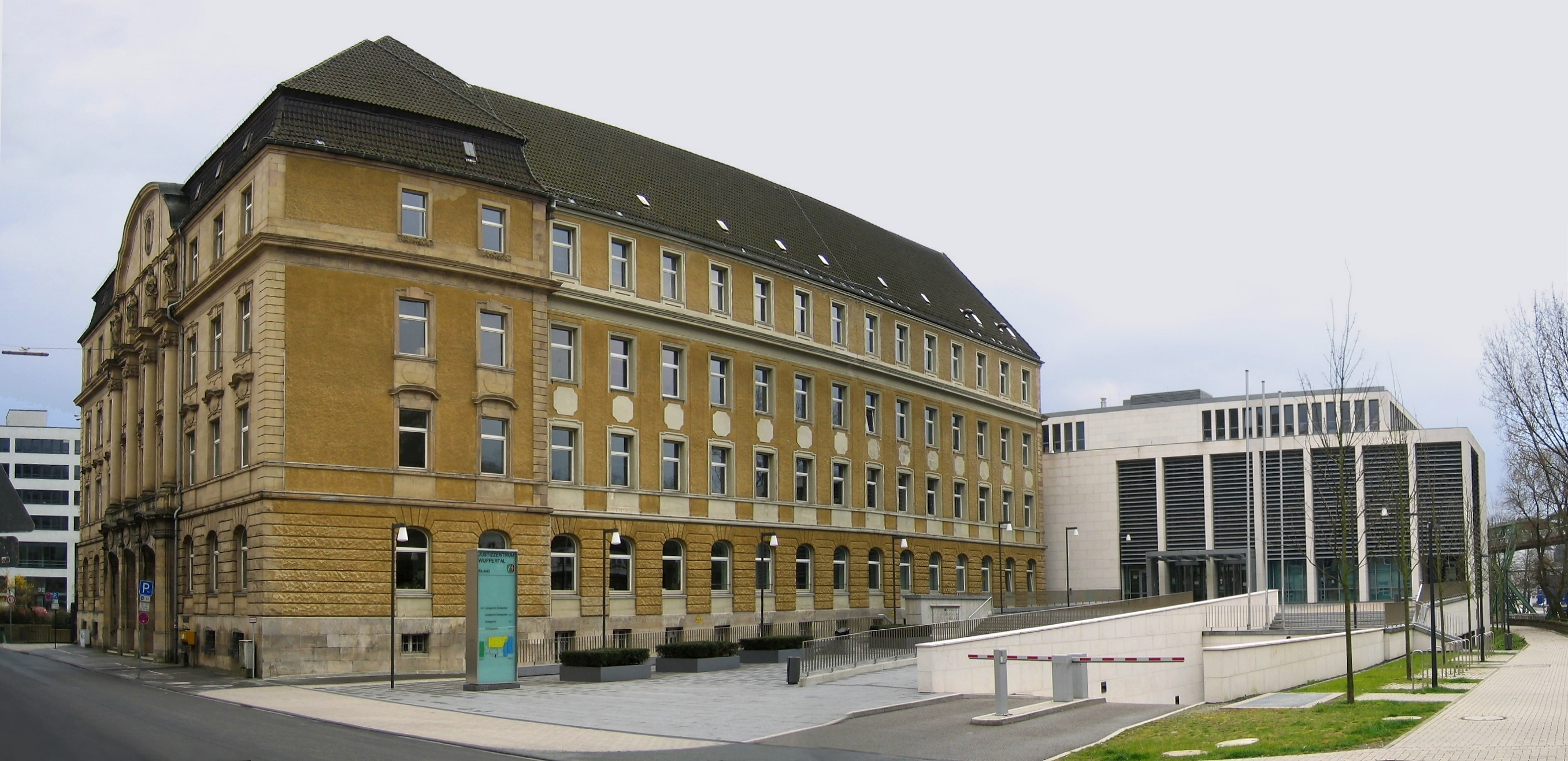 Justizzentrum in Wuppertal, Eiland. Amts-, Arbeits- und Landgericht (Strafsachen).